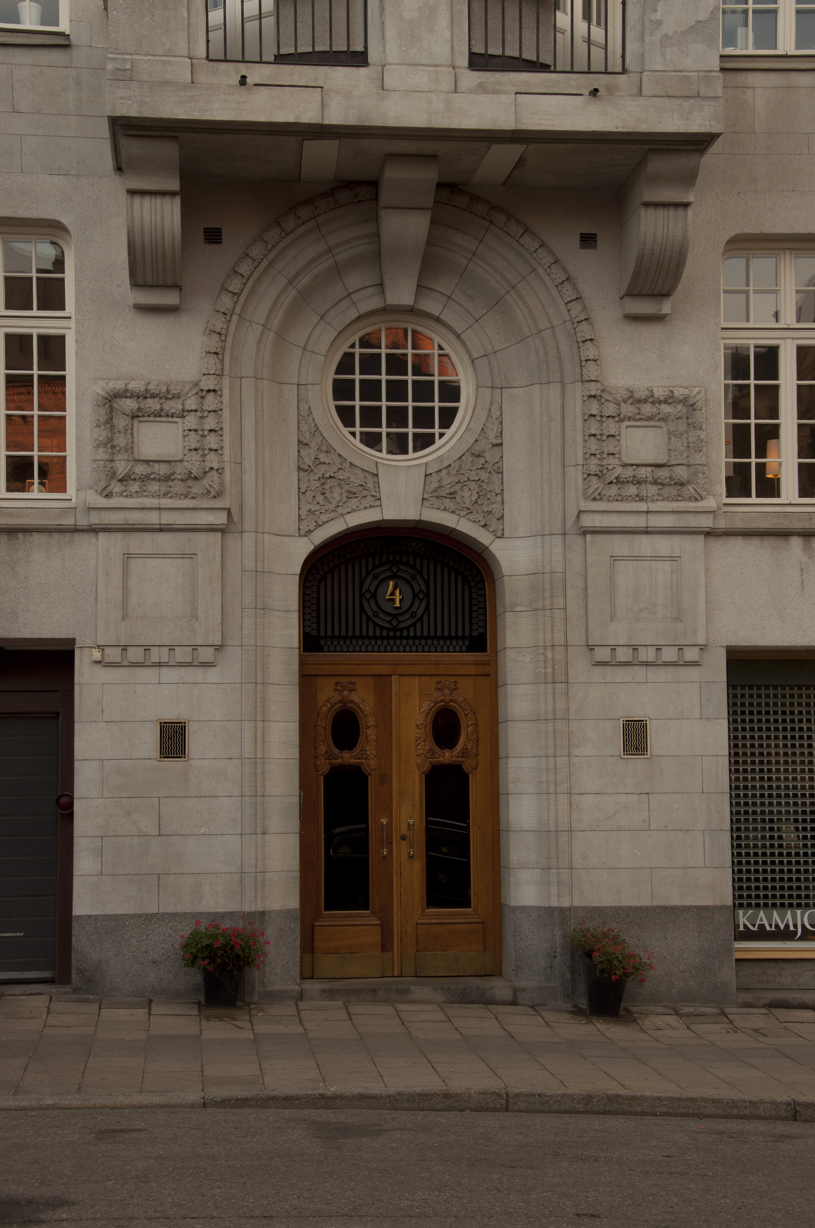 Artillerigatan 4, port